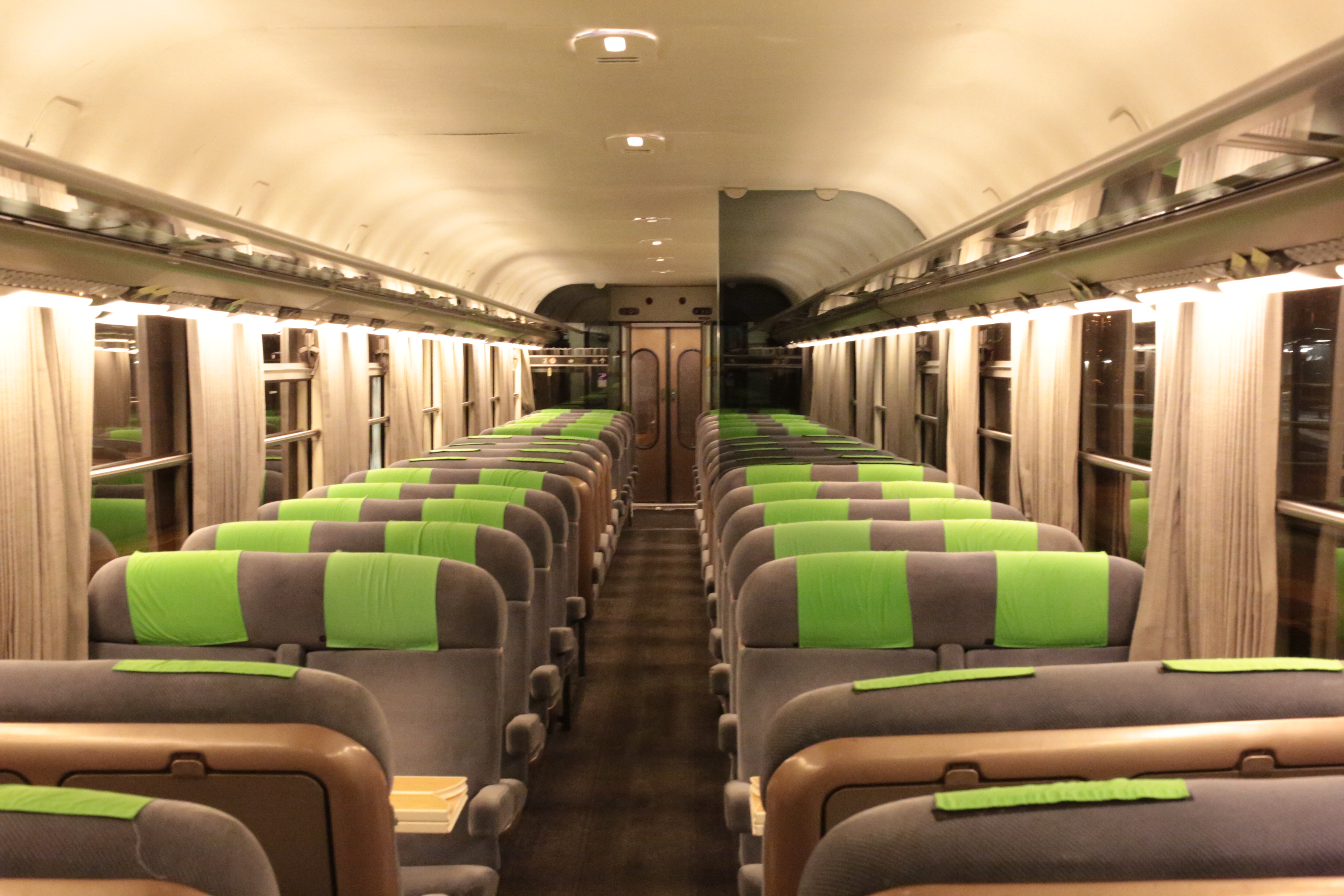 Intérieur d'un train Intercités Bordeaux-Rennes, de nuit